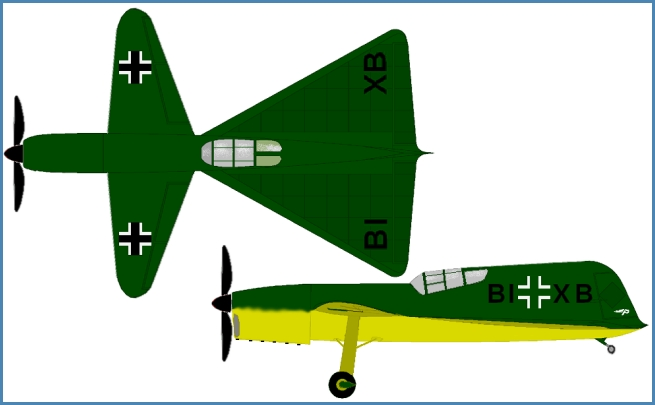 Payen Pa 22c